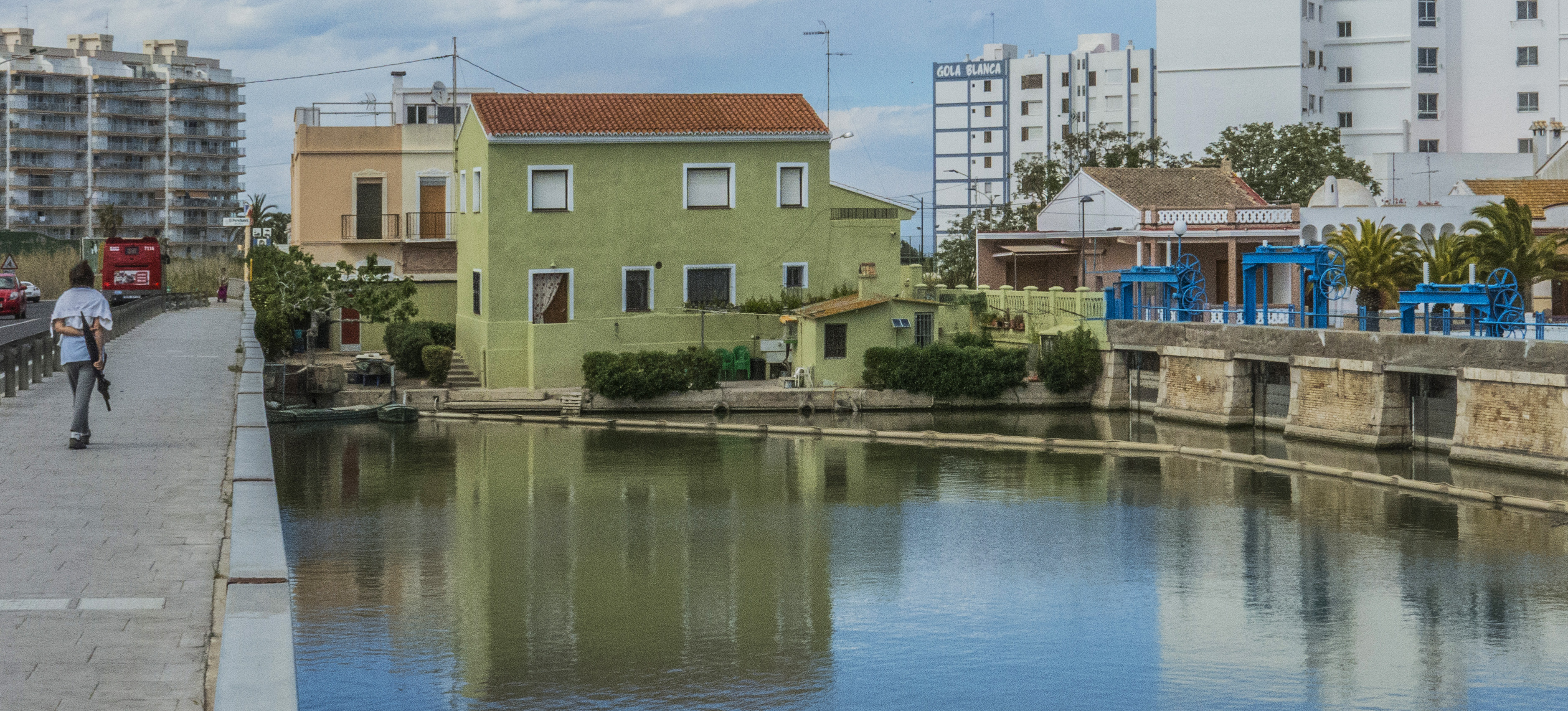 El Perelló és una entitat local menor que pertany al municipi valencià de Sueca. A la imatge, les comportes que s'utilitzen per regular el nivell de les aigües en l'Albufera, d'acord amb les necessitats agrícoles. (Viquipèdia)